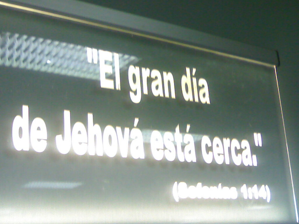 El gran día de Jehová está cerca. Profeta Sofonías 1:14